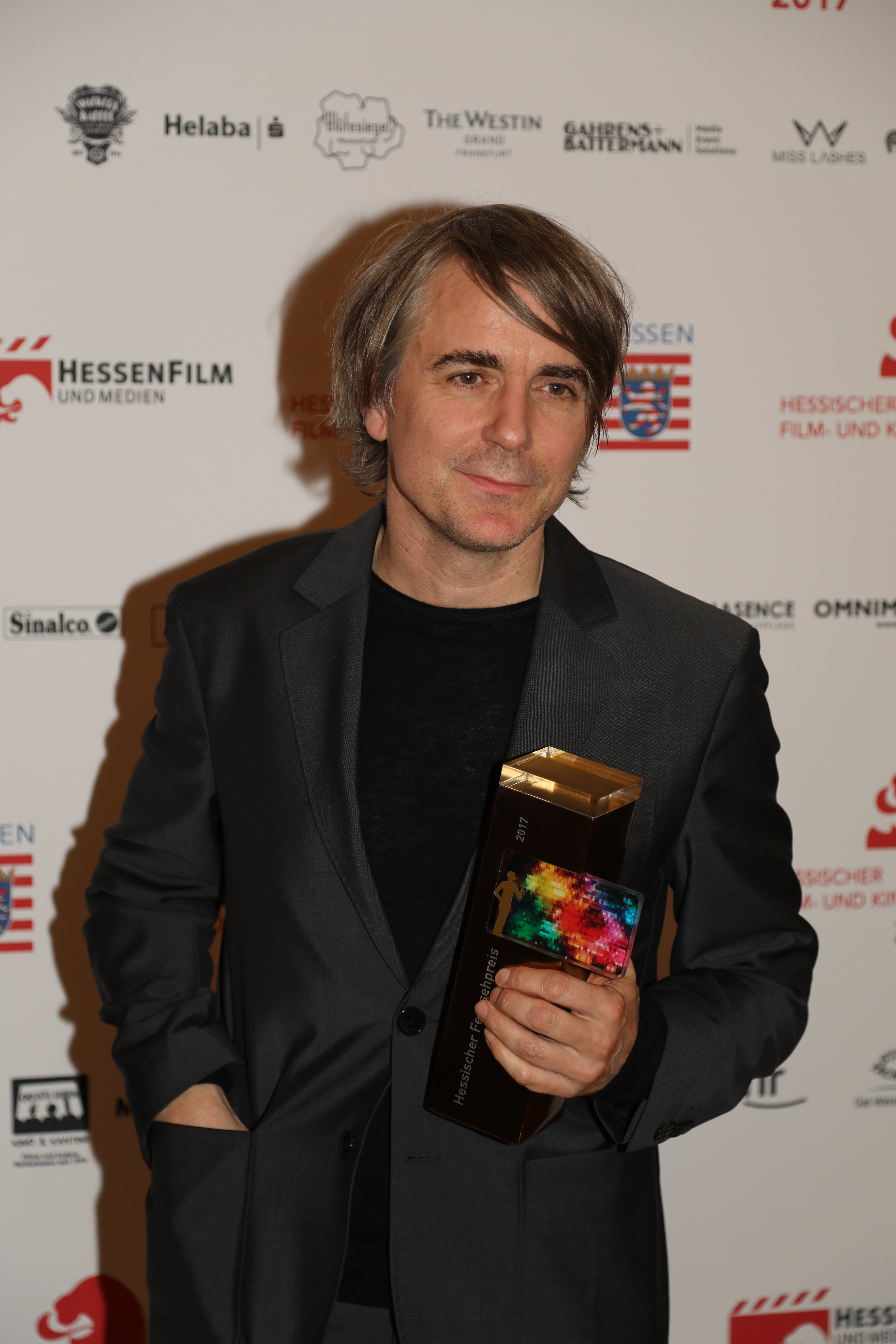 Jens Harzer beim Hessischen Film- und Kinopreis 2017